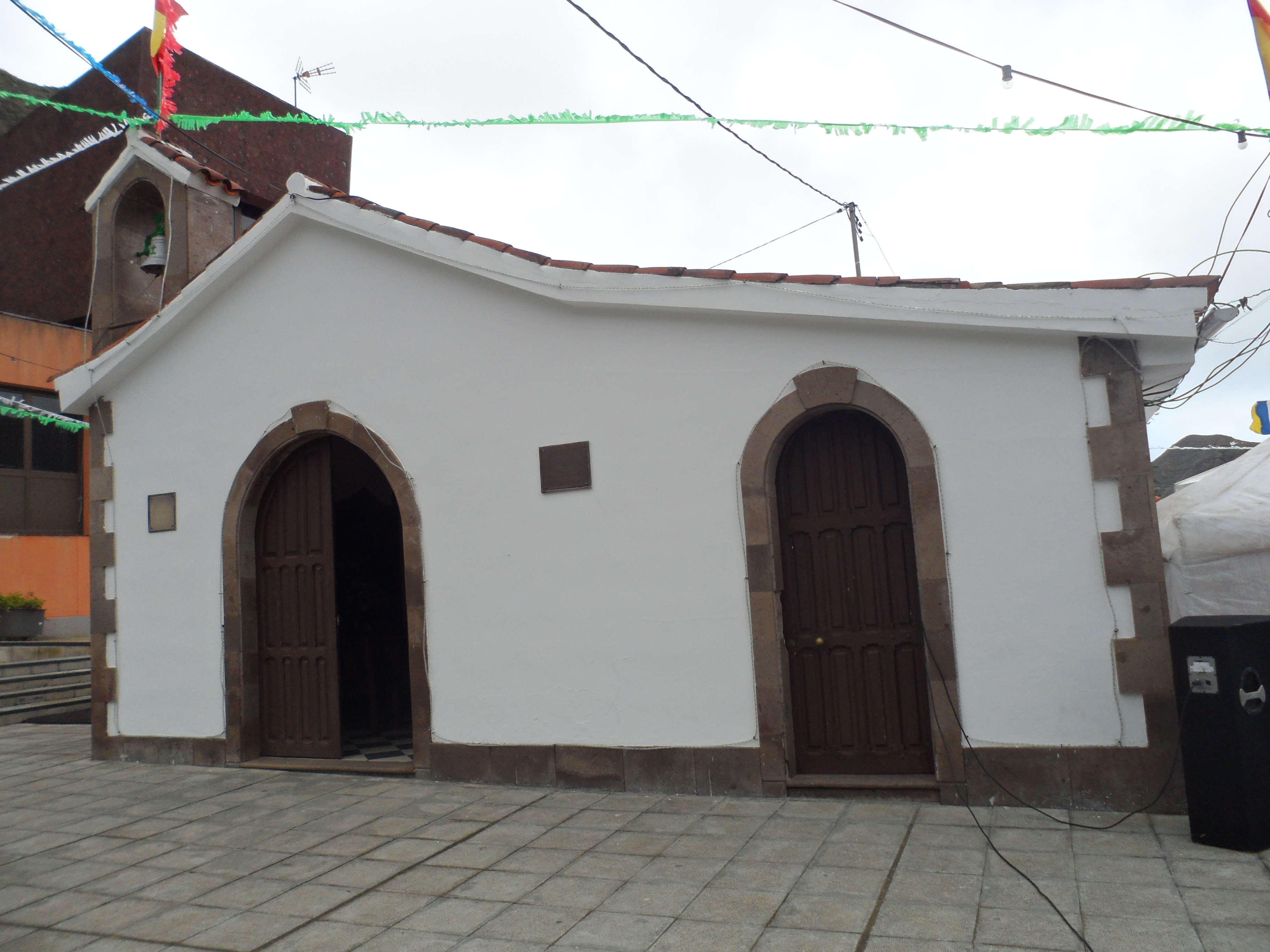 Ermita de la Virgen de Candelaria (Los Batanes, Tenerife).